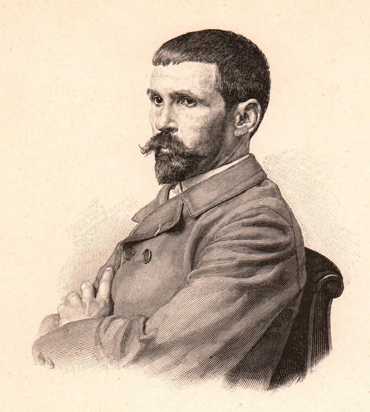 French painter Pascal Dagnan-Bouveret (1852-1929)